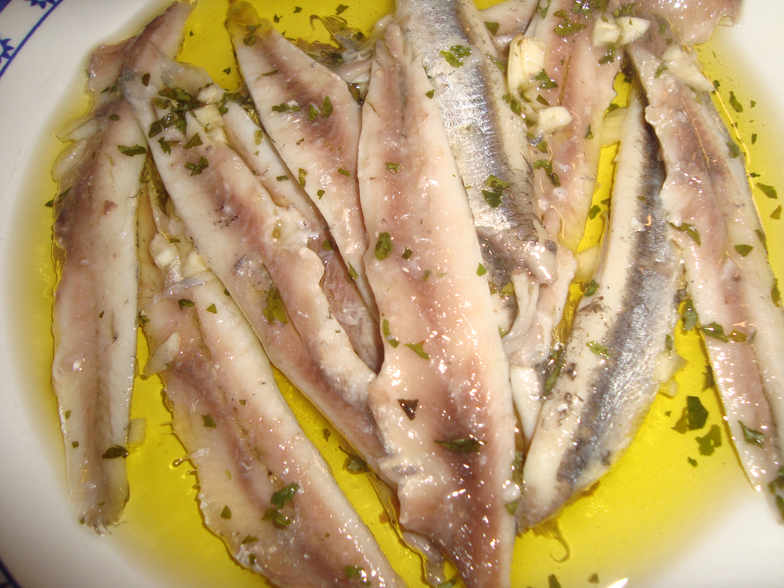 Boquerones curados en vinagre y aliñados con aceite, ajo y perejil